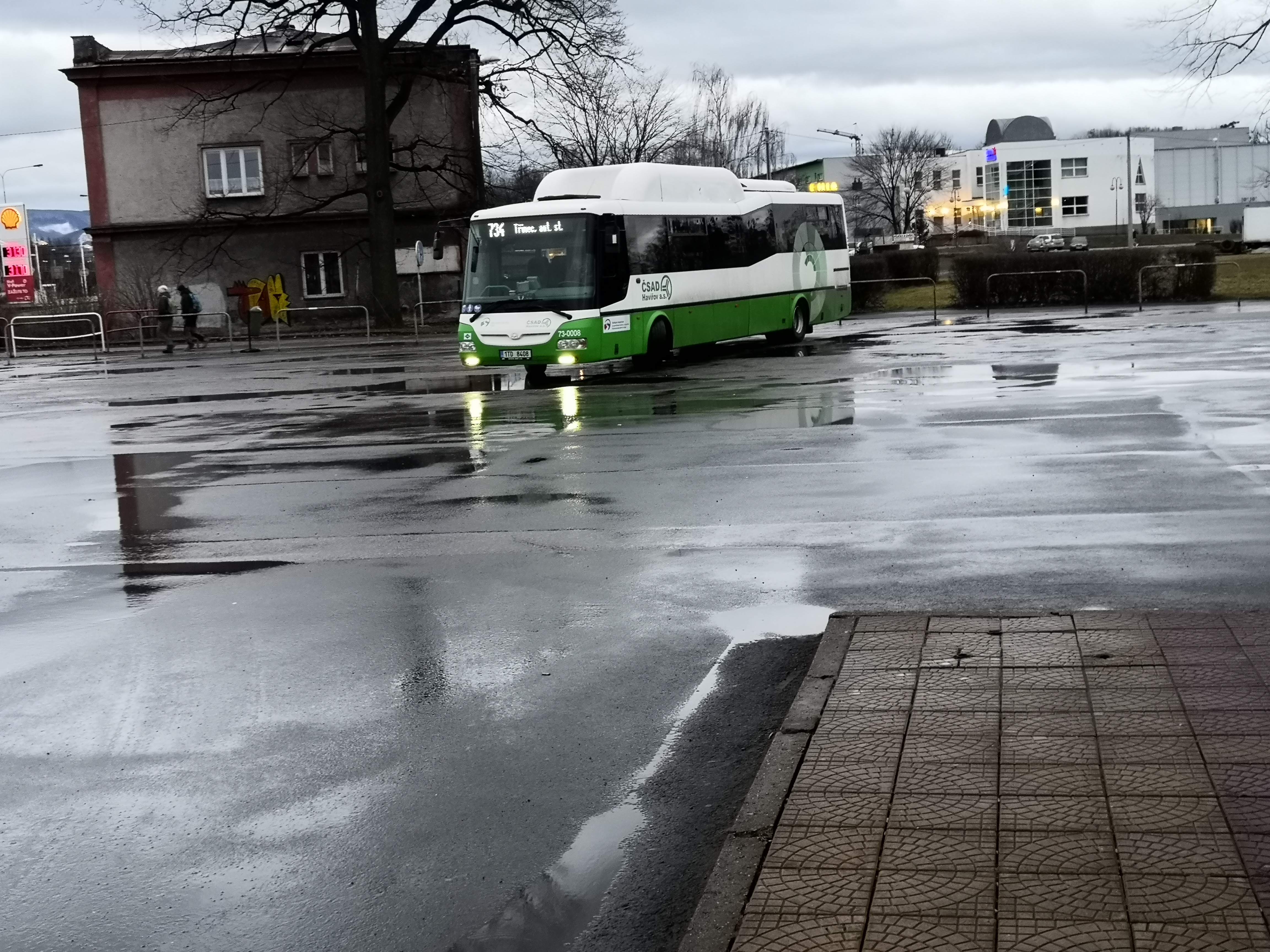 Autobus SOR 12 CNG dopravce ČSAD Havířov na lince 734 v Českém Těšíně